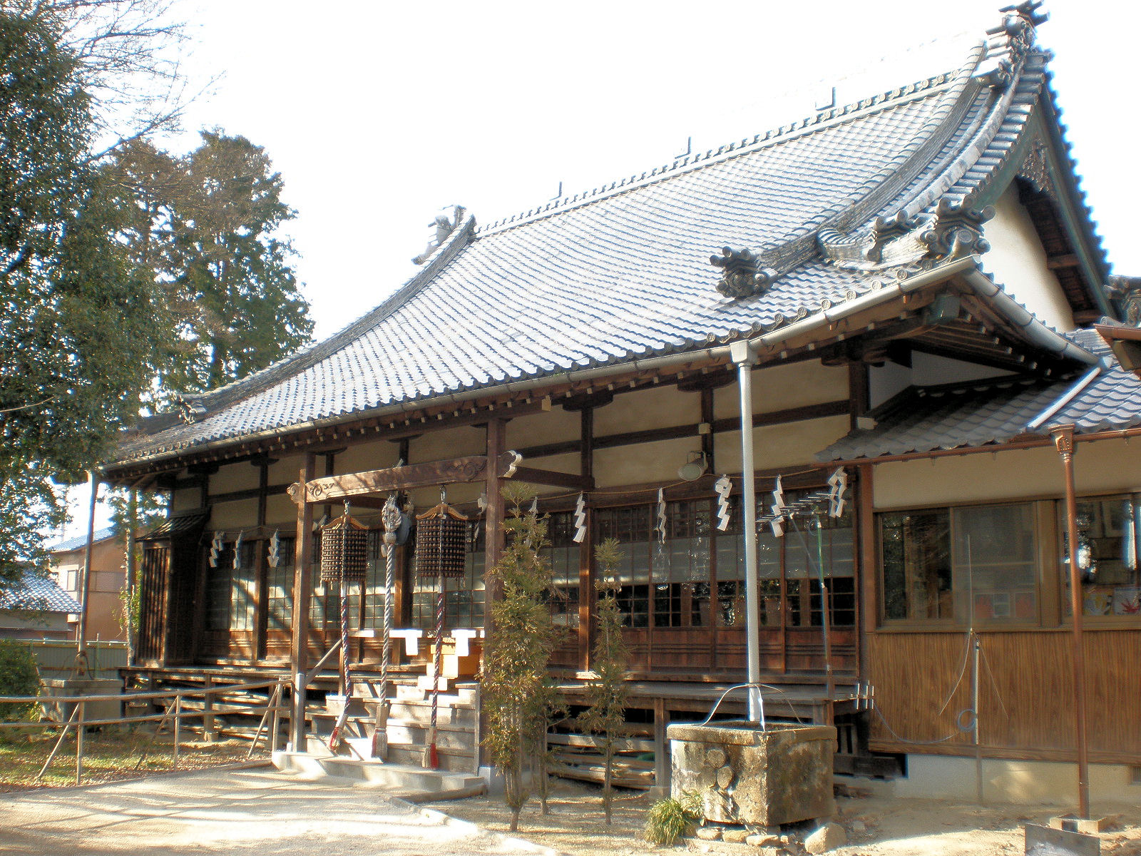 愛知県春日井市にある密蔵院の本堂